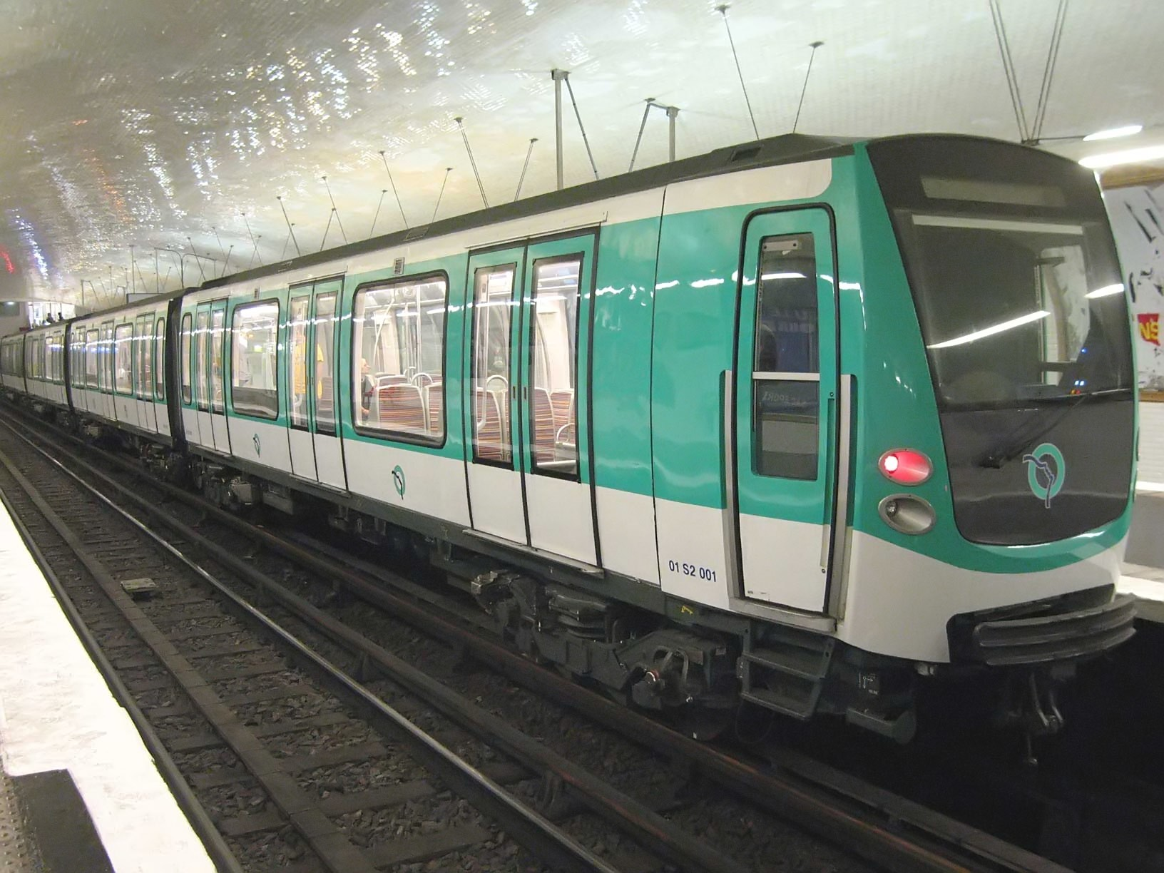 Description : Métro de Paris, rame de la série MF2000 (prototype). Vue latérale (photo très pixellisée), station Porte d'Ivry, Journées du Patrimoine. Lieu : Paris, France Date : Septembre 2006 Auteur : Pline photo personnelle